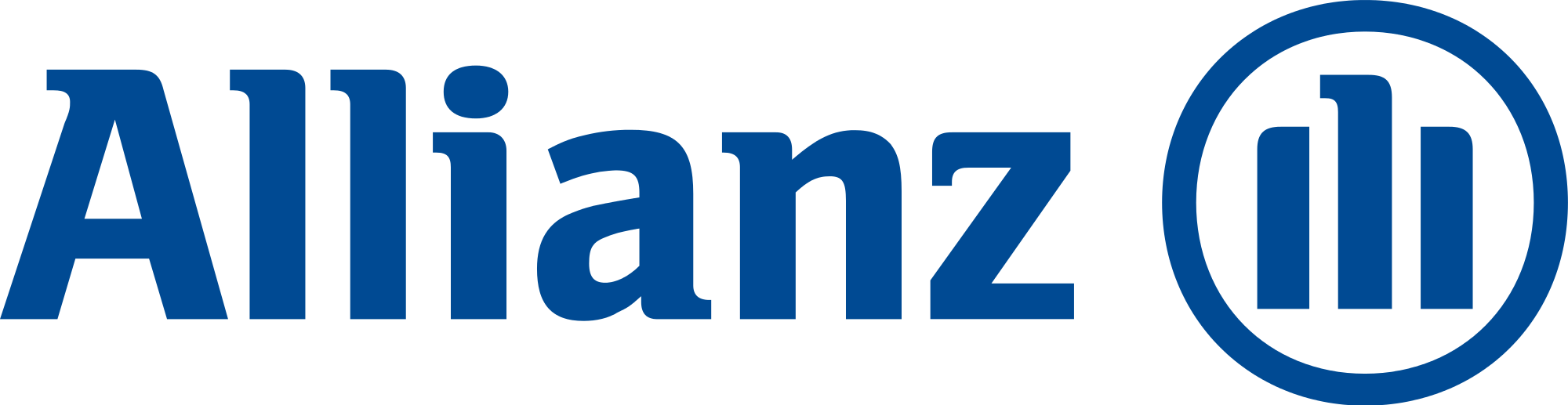 alianz